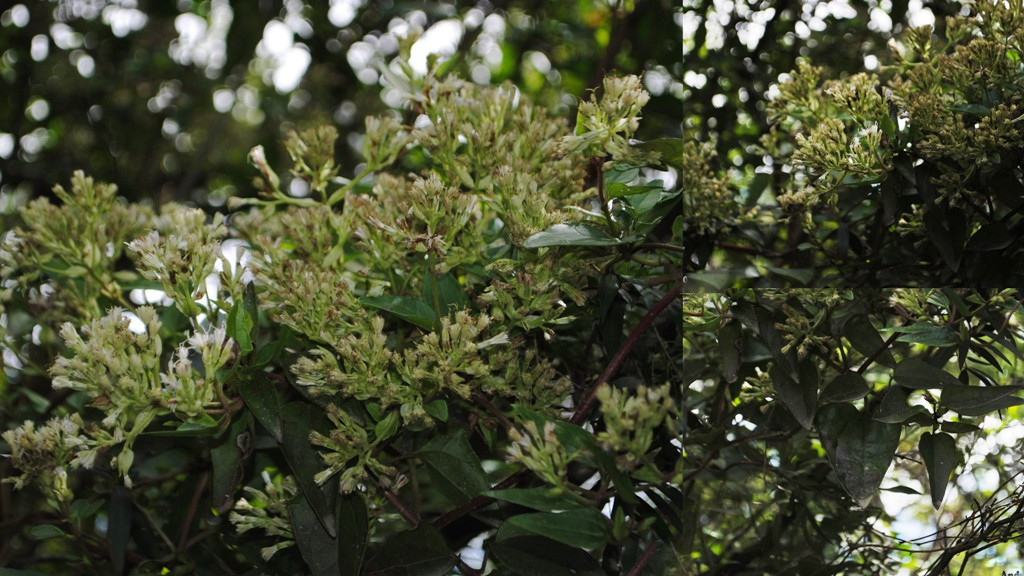 Mikania involucrata. Asteraceae. Fotos tomadas en bosque ribereño al margen del Arroyo del Oeste en Sierras de Rocha, departamento de Rocha, Uruguay.